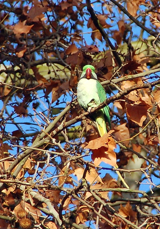 Alexandersittich Psittacula eupatria, Schloßpark Biebrich, Wiesbaden, Hessen, Deutschland